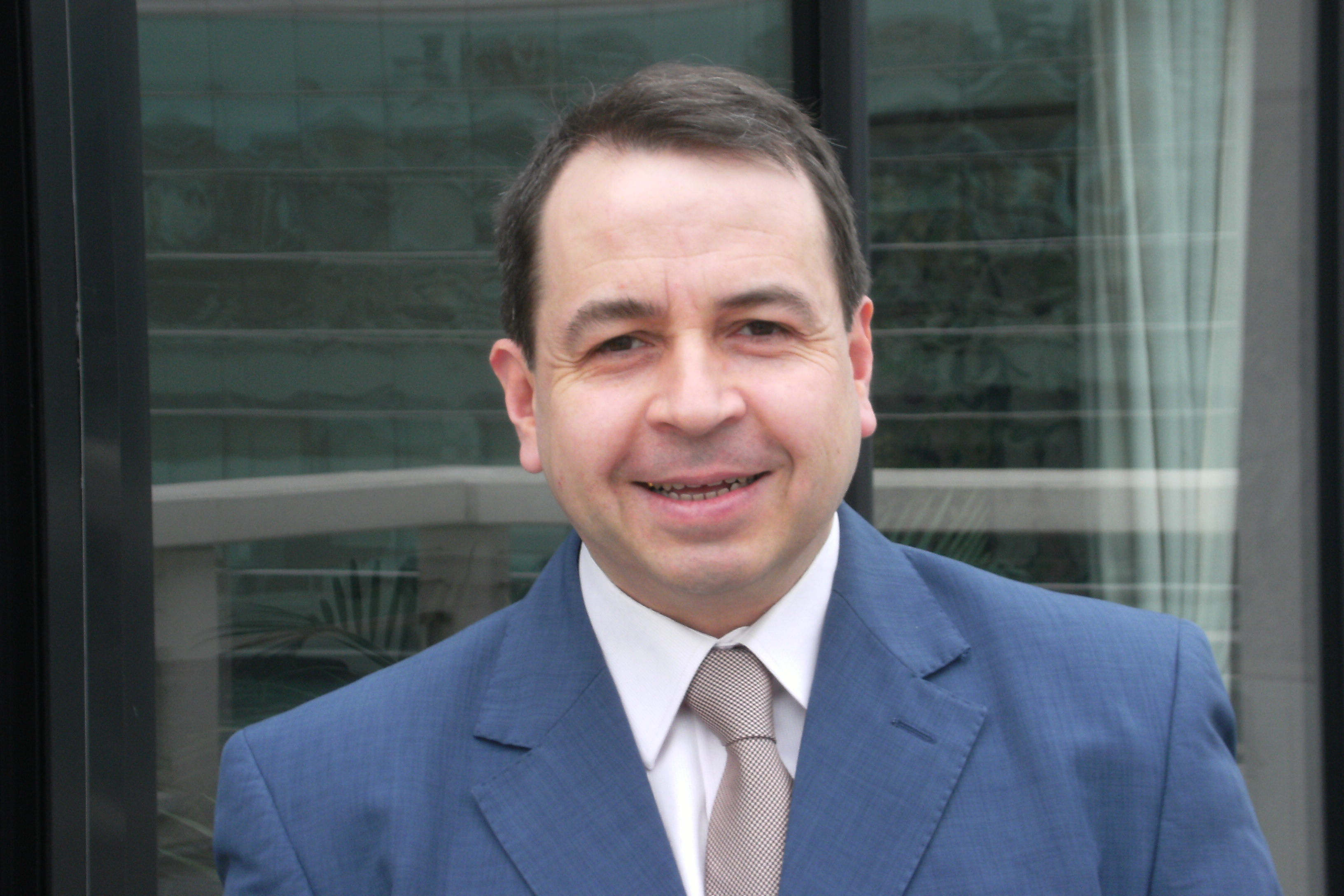 Jean-Pierre Thiollet, journaliste et écrivain français